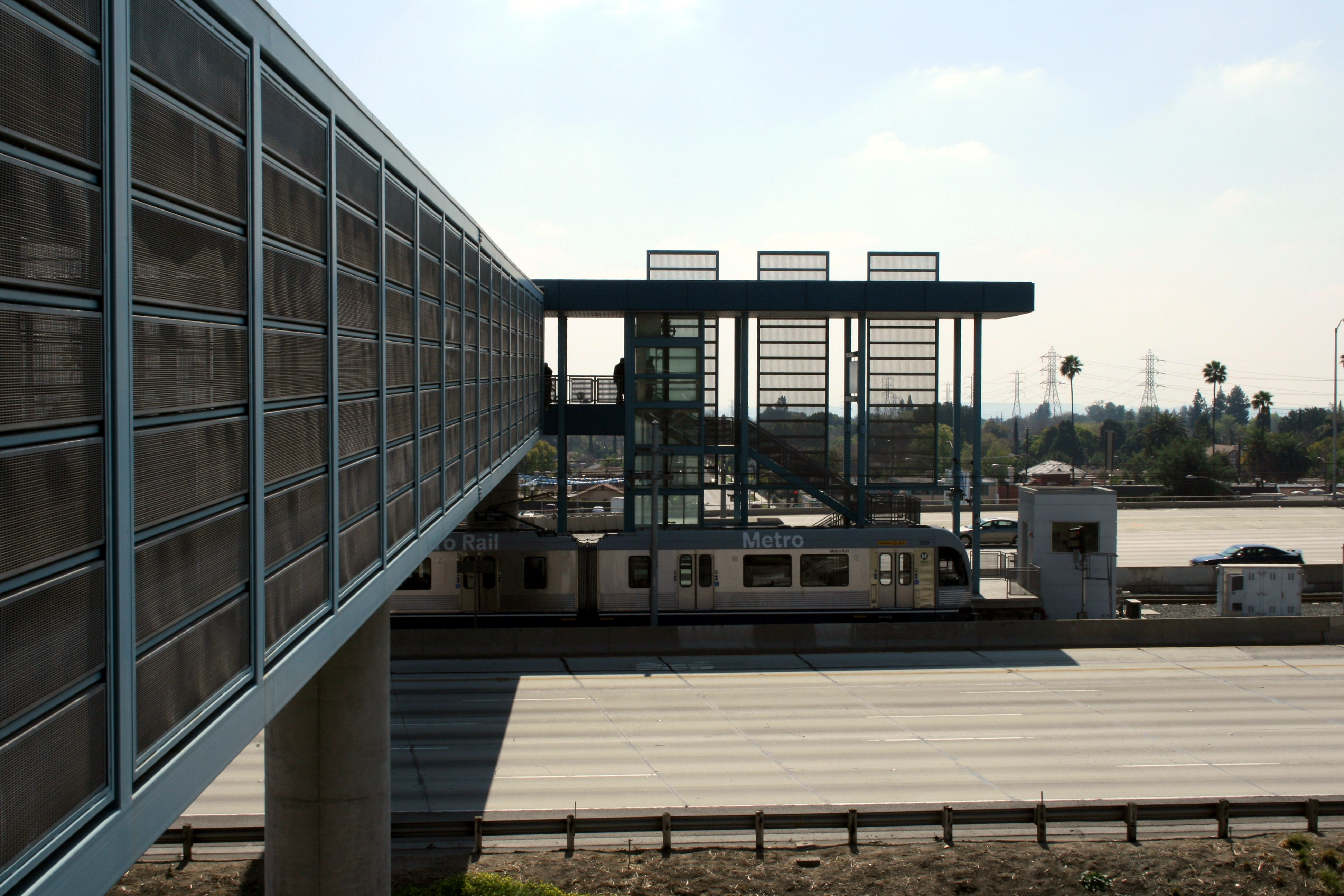 Metro Gold Line, Sierra Madre Villa Station, Pasadena, California